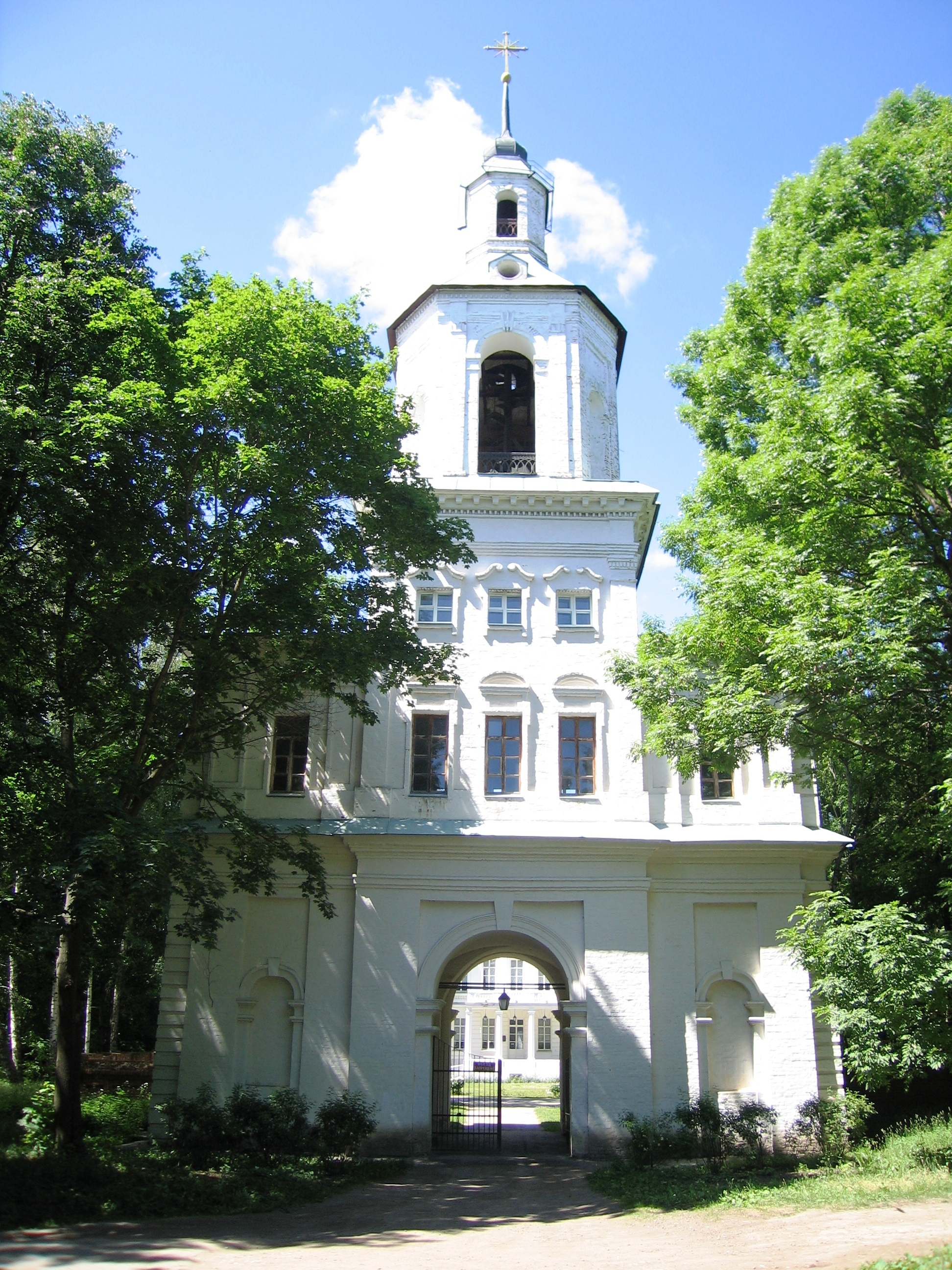 Дворец-музей графов Бобринских.